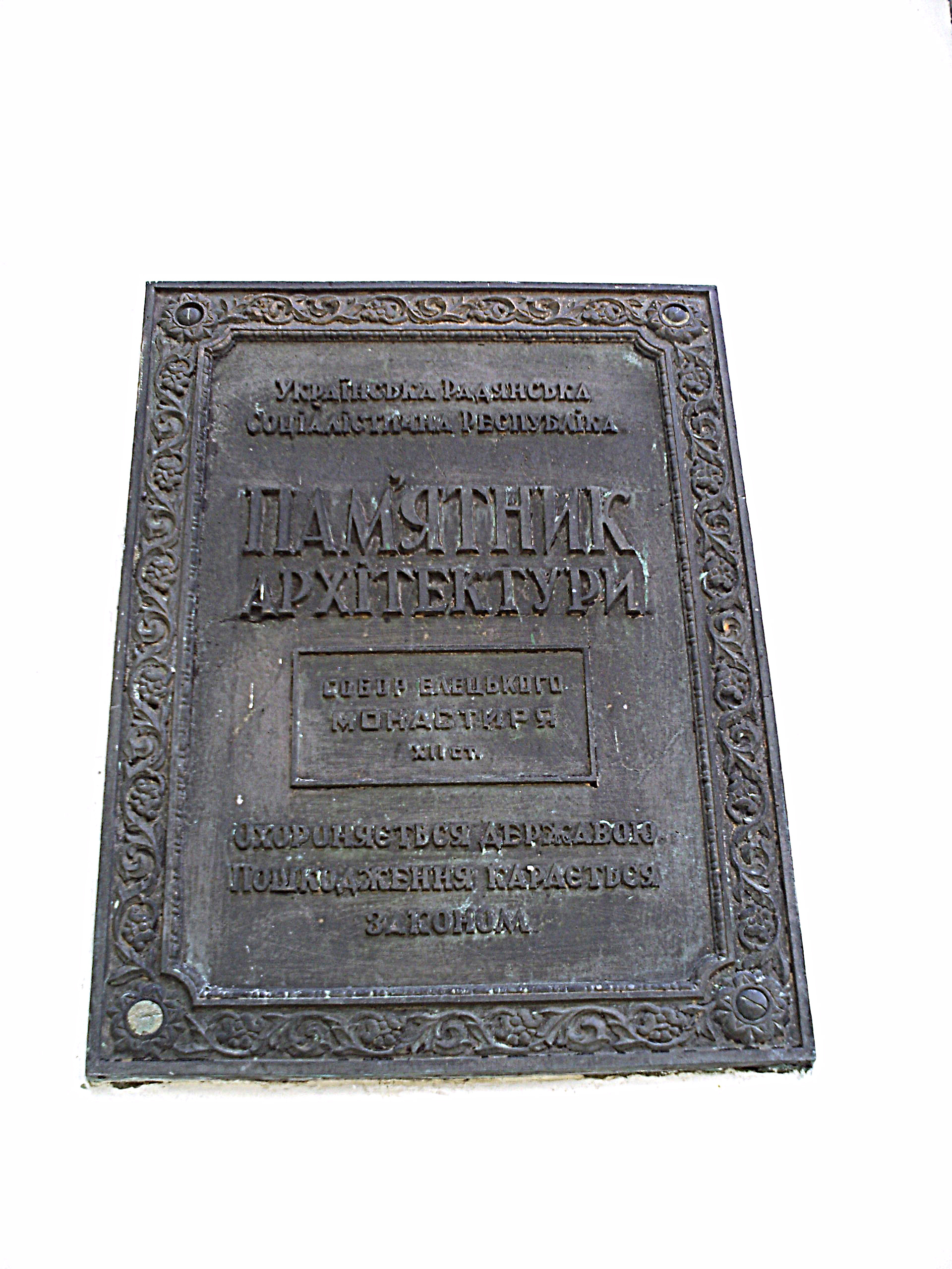 Успенський_собор_-_памятка_архітектури